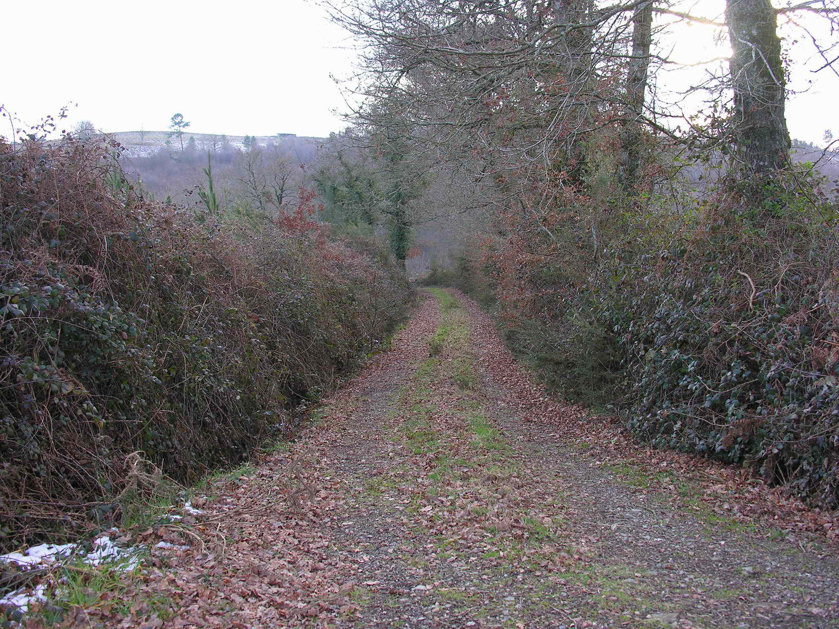 self made. A tres quilómetros de Arzua